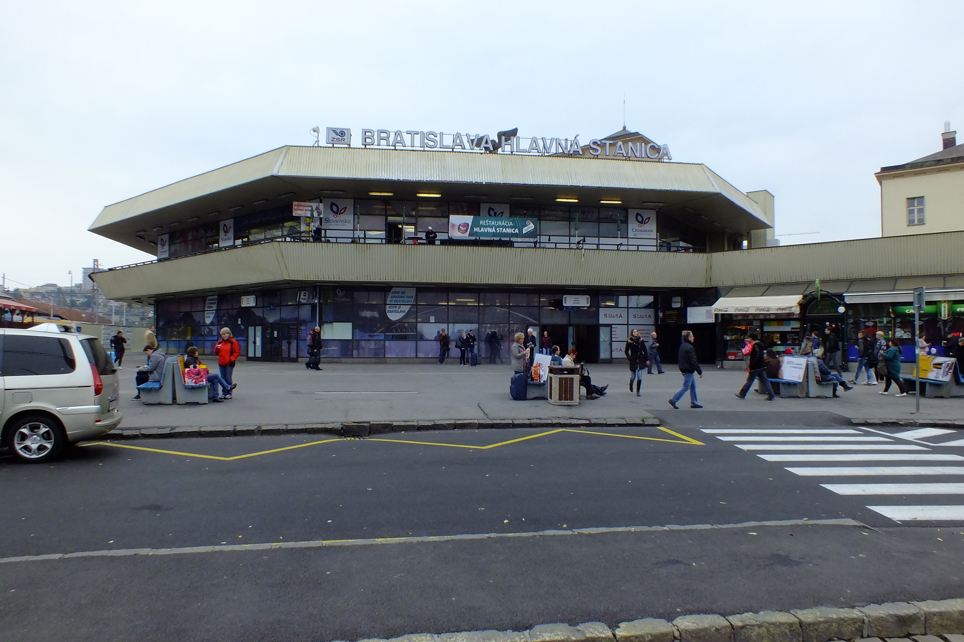 Hlavna stanica